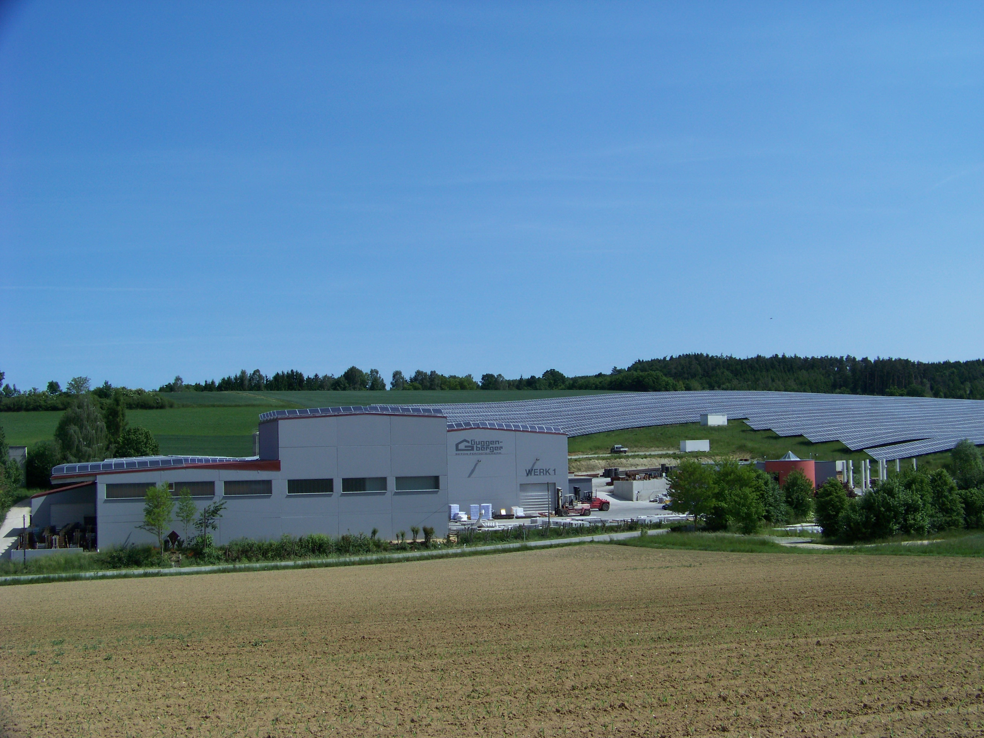 Laberweinting, Hofkirchen. Das Betonfertigteilwerk mit Bürogebäude am Poschenhof. Dahinter die Photovoltaikanlage an der Weinleite.